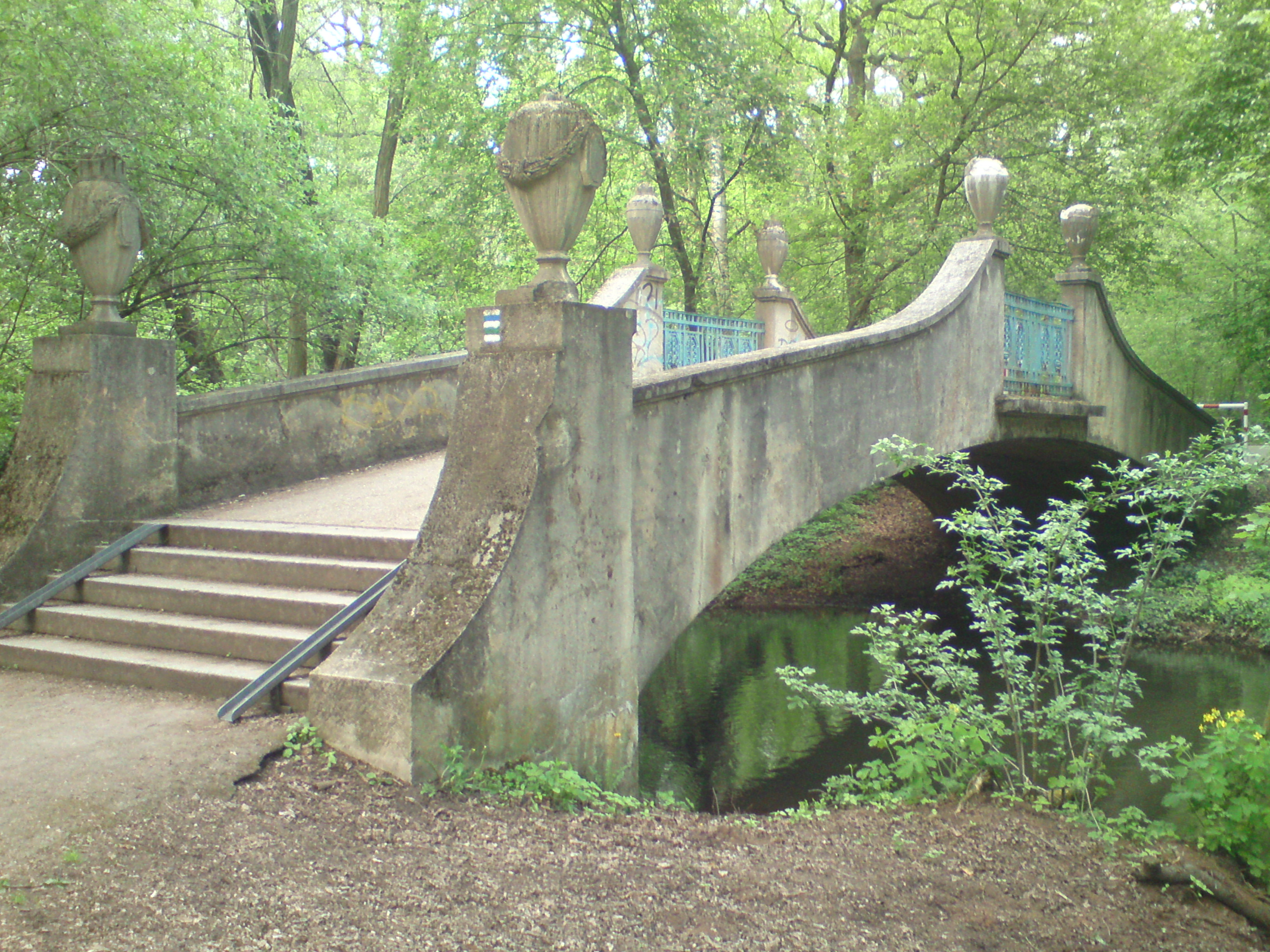 Jubiläumsbrücke im Cottbuser Volkspark